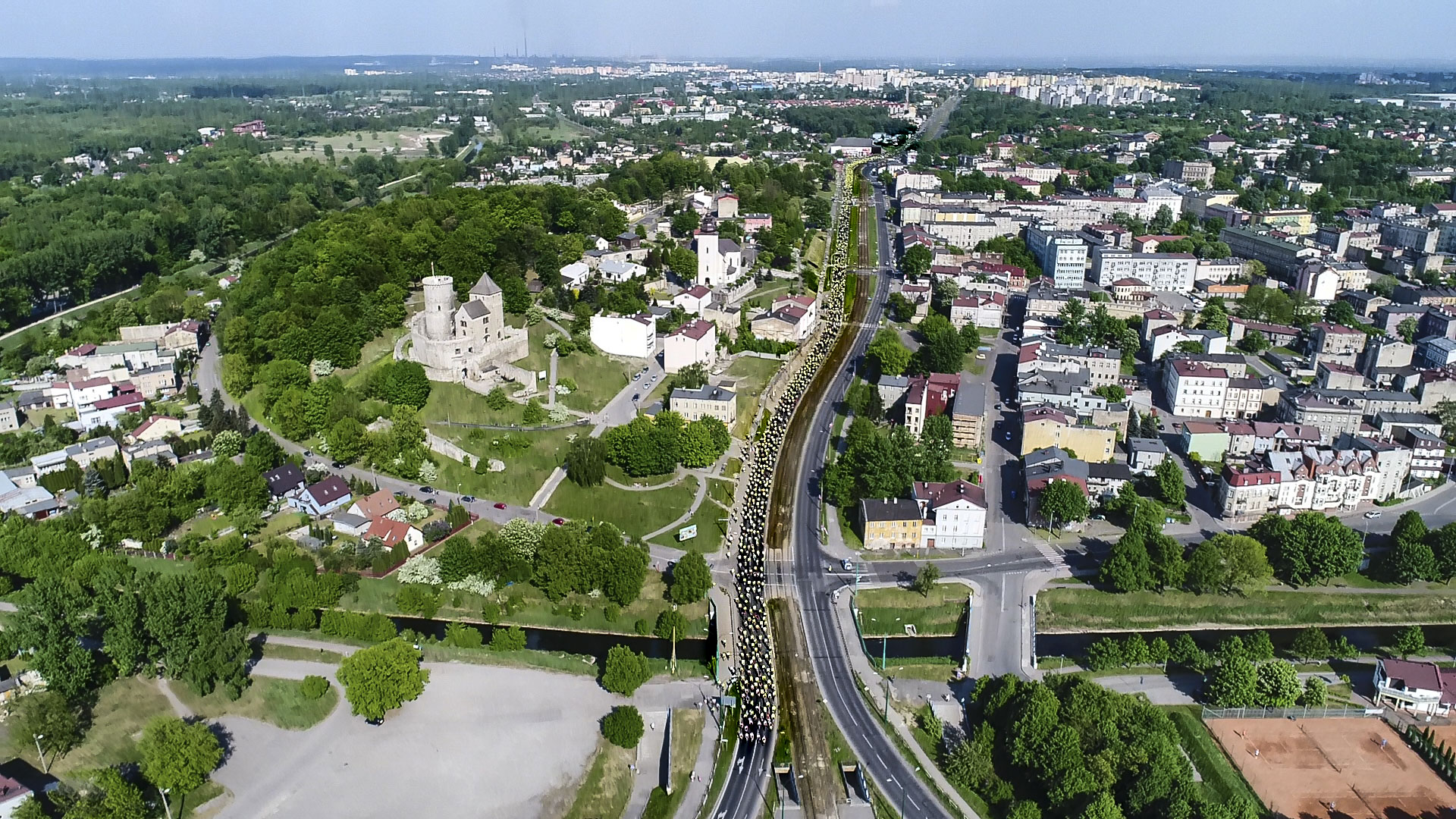 Widok peletonu z góry